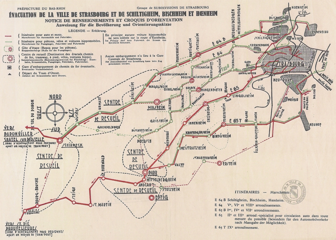 Carte plan de l’évacuation de l’Alsace septembre 1939.